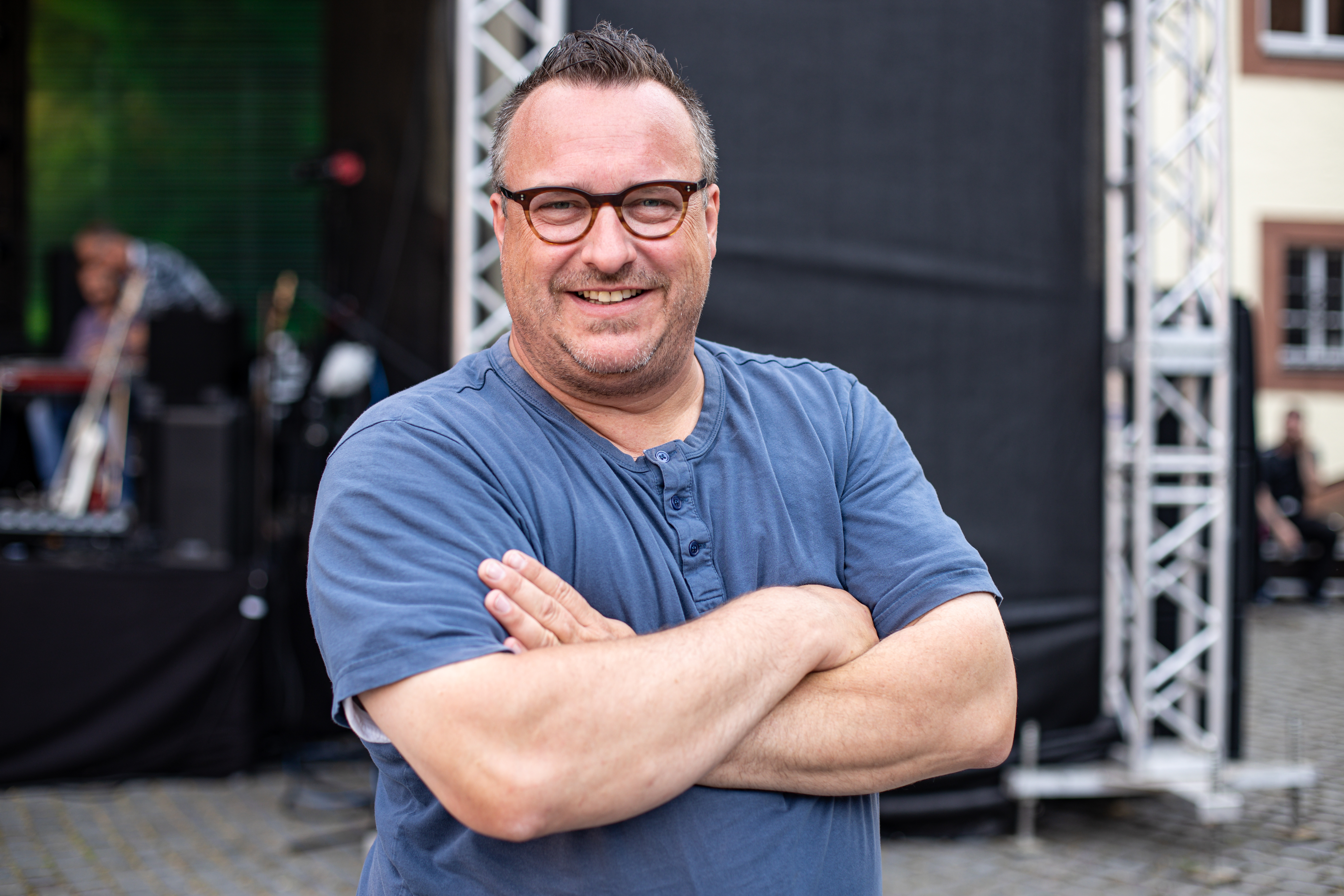 Andy Becht, Juni 2019